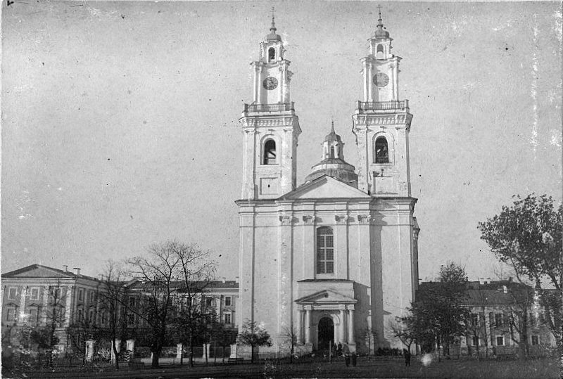 Беларуская (тарашкевіца): Полацак (Połacak), пляц Рынак (plac Rynak). Касьцёл Сьвятога Стэфана і калегіюм езуітаў